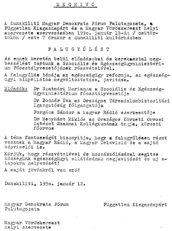 Meghívó, a dunakiliti falugyűlésre 1990-ből.